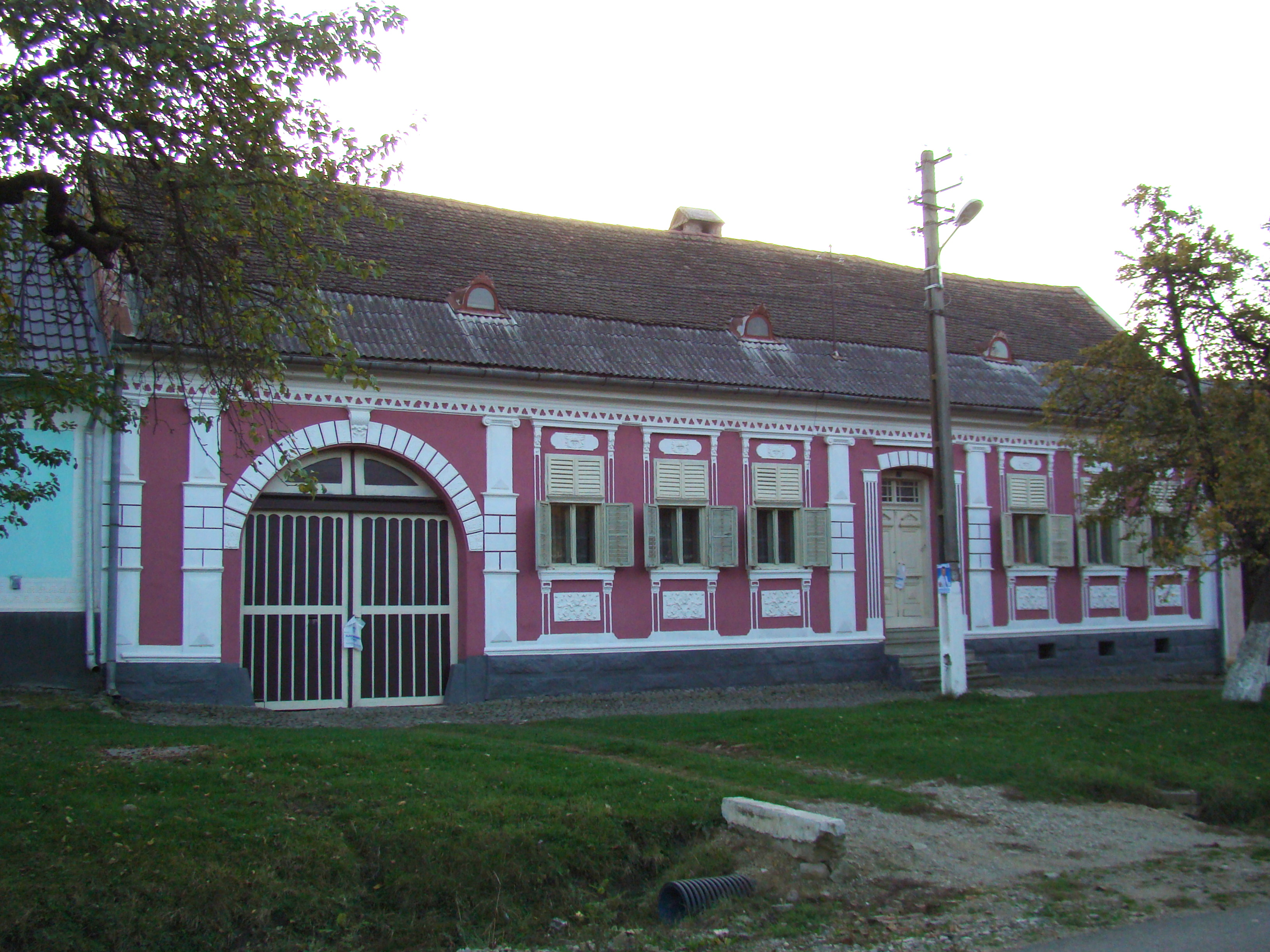 Ansamblul rural „Dorolea” (fosta localitate săsească „Kleinbistritz”), sat Dorolea; comuna Livezile, județul Bistrița-Năsăud